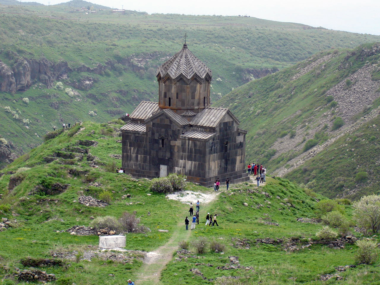 եկեղեցի Ս. Աստվածածին 28/5.2